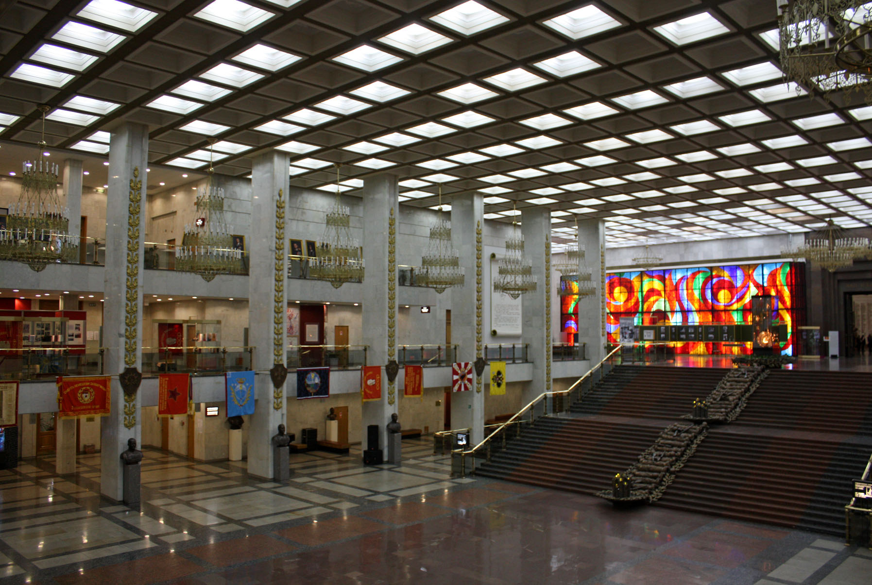 Центральный музей Великой Отечественной войны (Москва). Зал полководцев